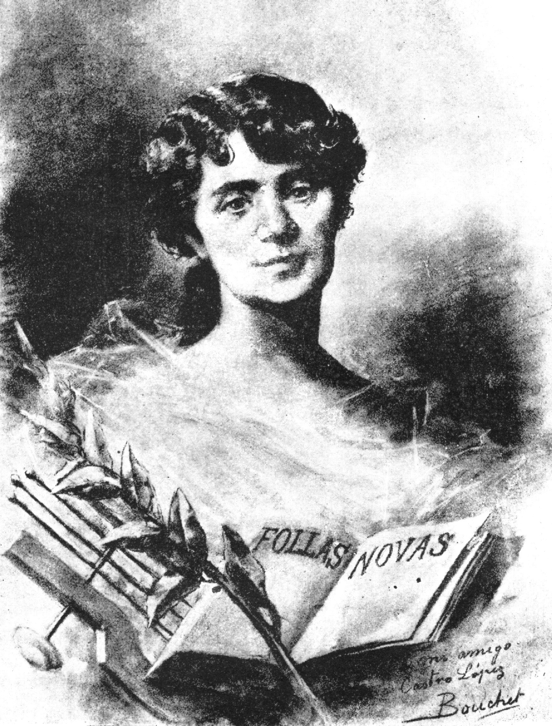 Rosalía Castro de Murguía. A mi amigo Castro López, Bouchet